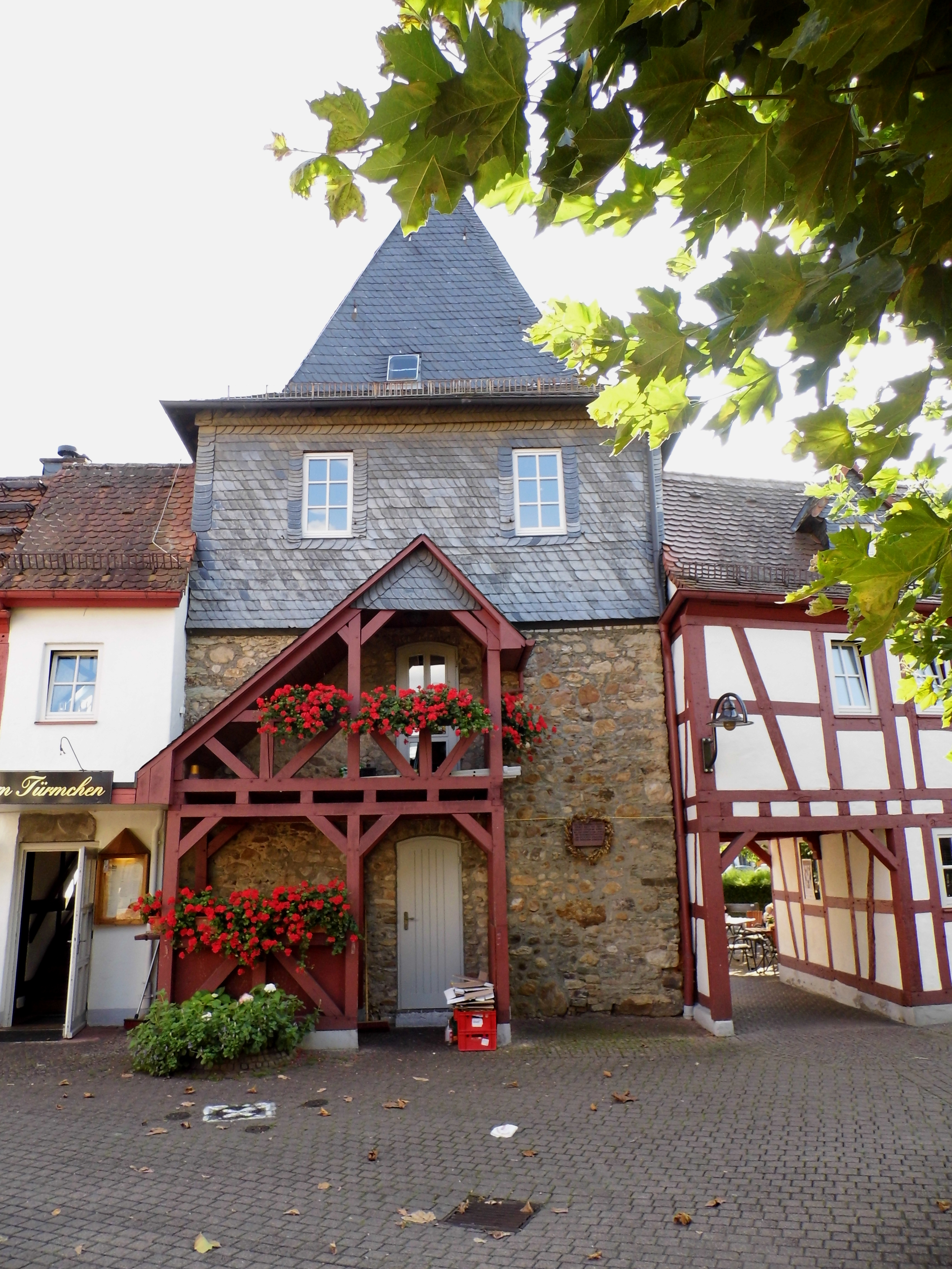 Hofheim, Burggrabenstraße 14, Innenseite